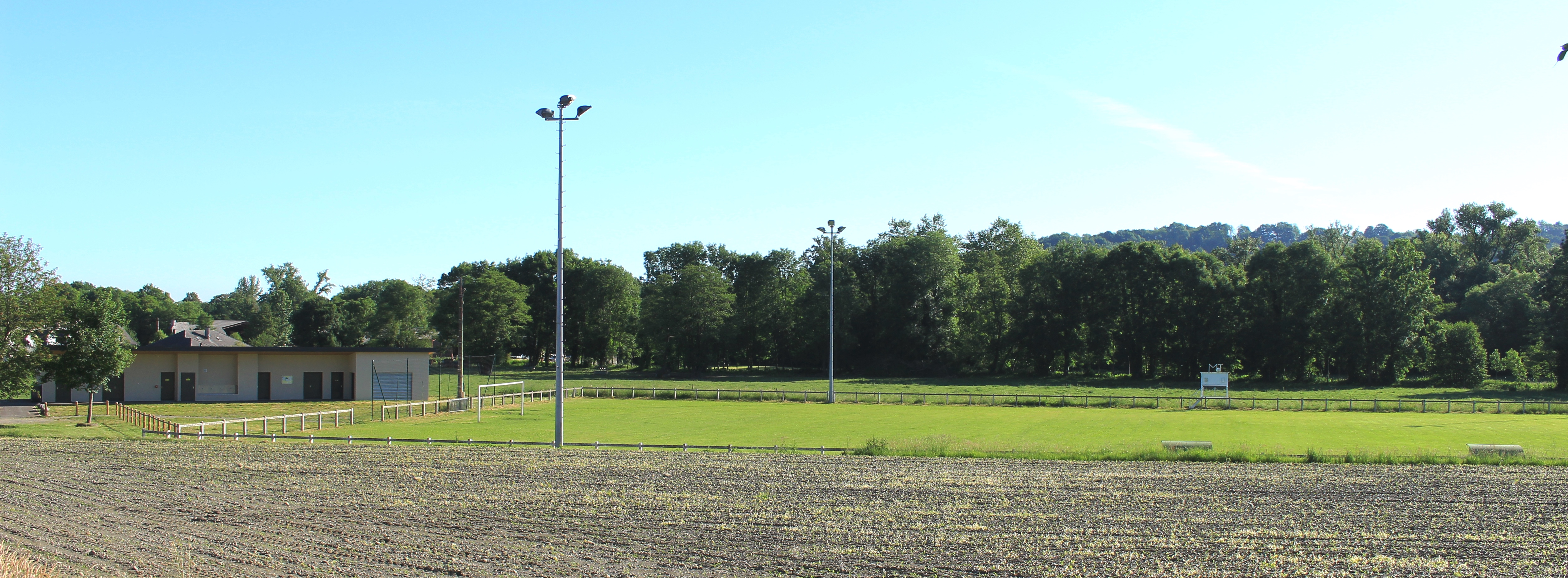 Stade de football de Montgaillard (Hautes-Pyrénées)